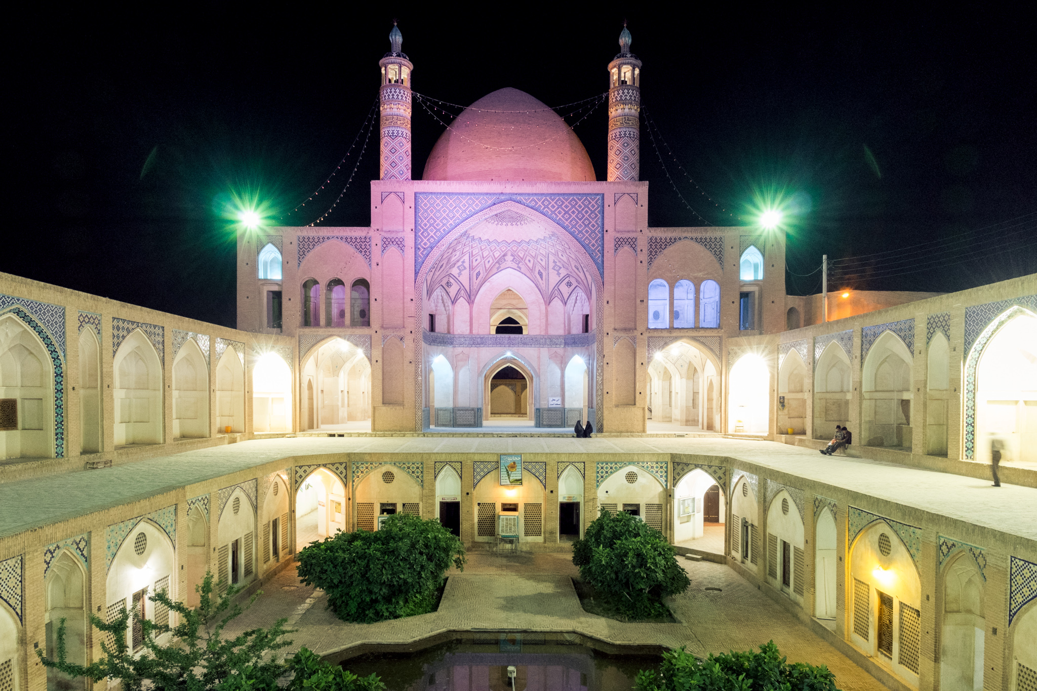 La mosquée Agha Bozorg est une mosquée historique de la ville de Kashan, en Iran.